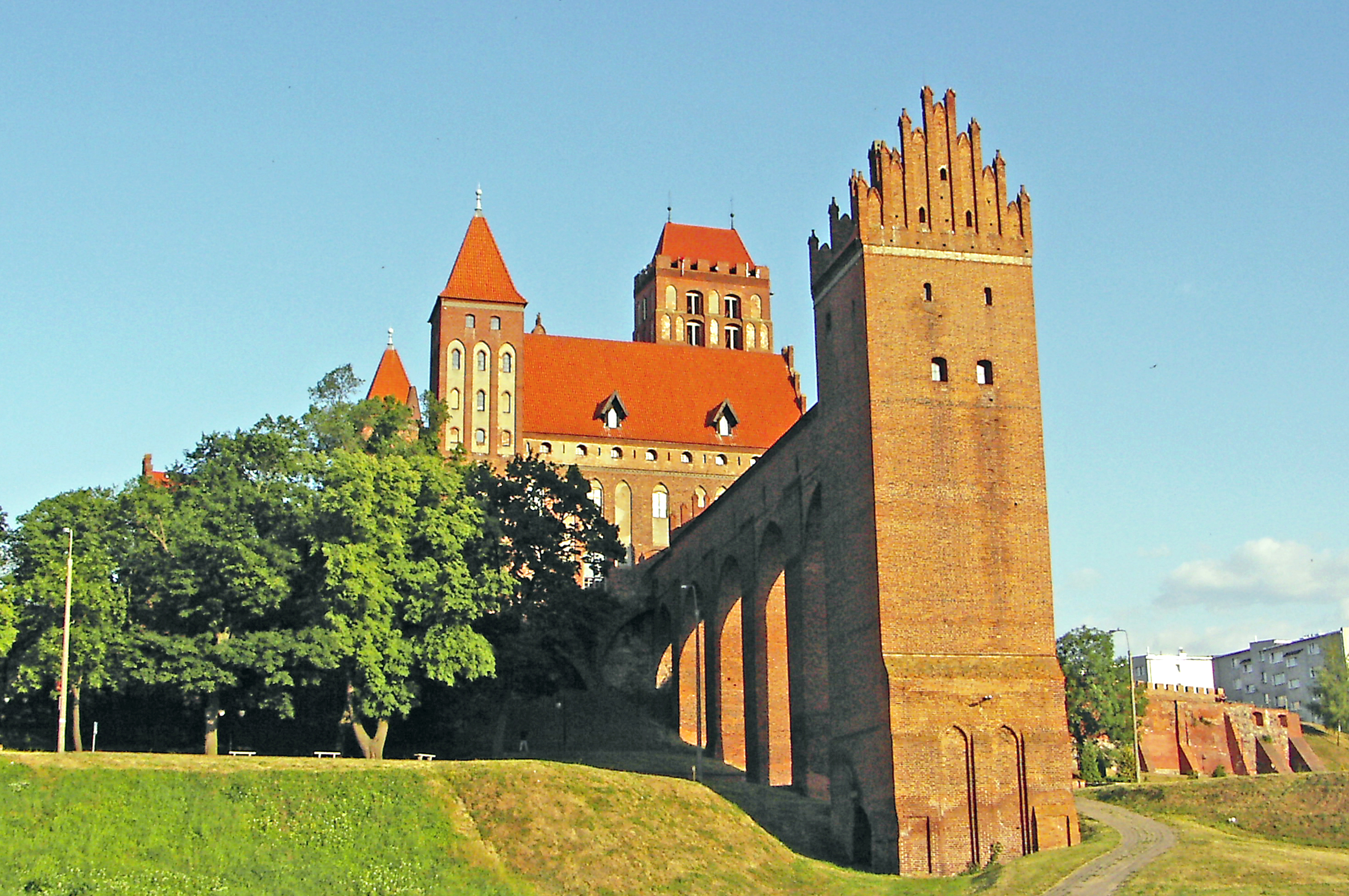 Kwidzyn, Zamek od strony zachodniej